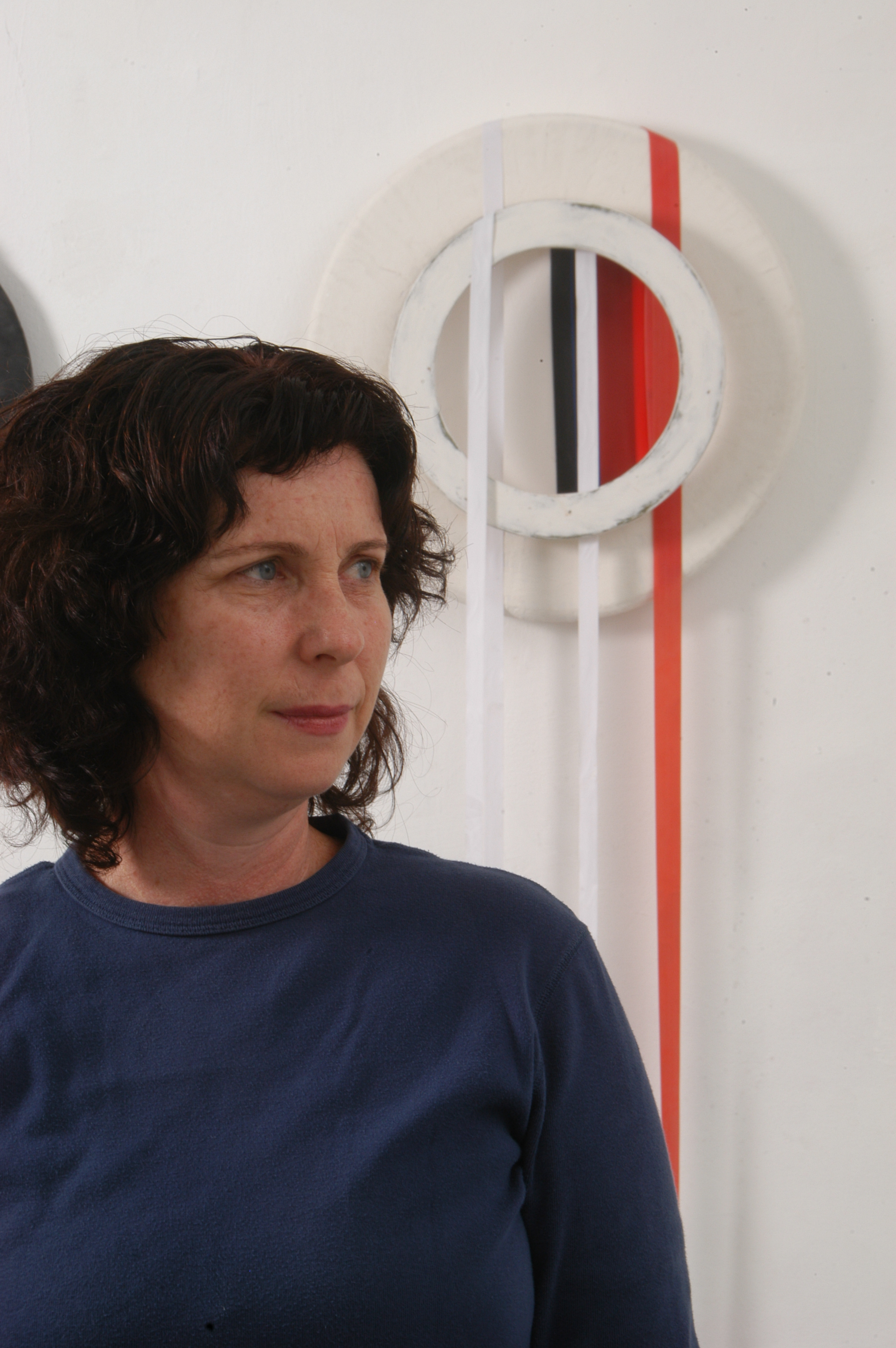 האמנית נגה יודקוביק - עציוני